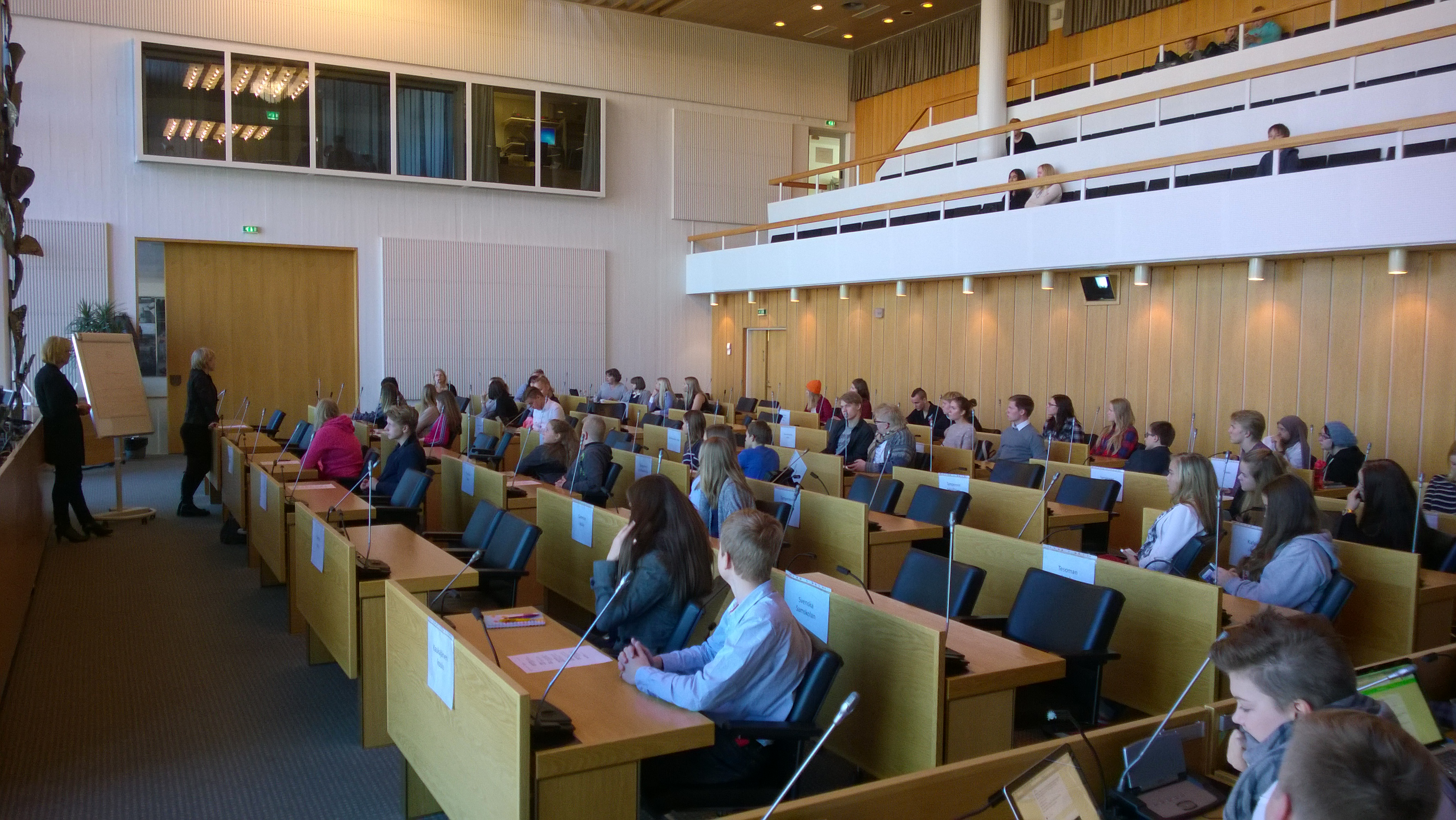 Tampereen nuorisovaltuuston suurkokous käynnissä Tampereen keskusvirastotalolla kaupunginvaltuuston istuntosalissa lokakuussa 2015. Kuvassa vasemmalla nuorten tentattavana myös apulaispormestarit Anna-Kaisa Heinämäki ja Leena Kostiainen.